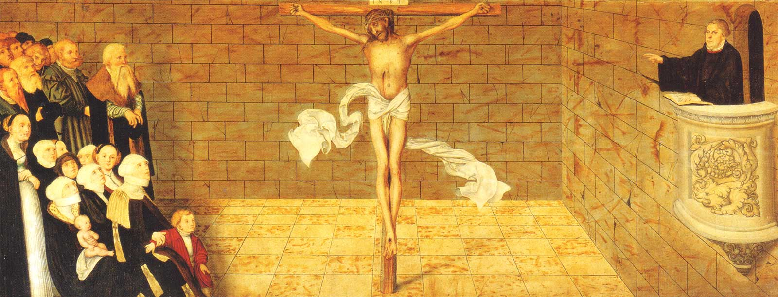 Reformation altarpiece, Stadt- und Pfarrkirche St. Marien zu Wittenberg, Predella (The Last Supper with Luther amongst the Apostles)